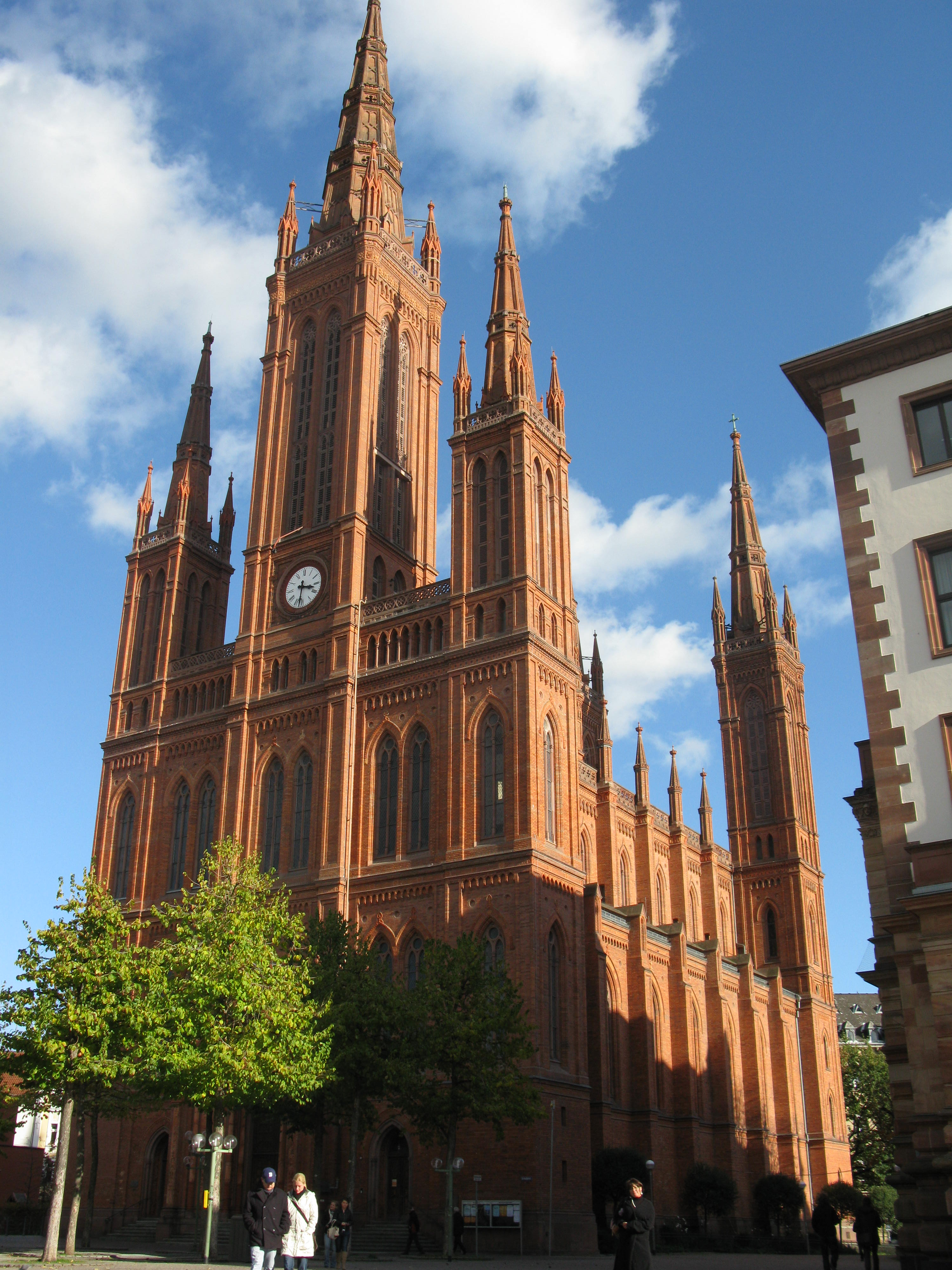 Wunderschöne Marktkirche in Wiesbaden